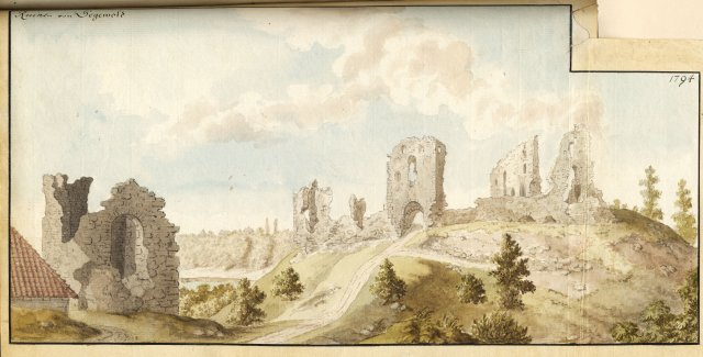 Scan from Johann Christoph Brotze's book Sammlung verschiedner Liefländischer Monumente. Ruinen von Segewold. 1794 [die Ansicht].